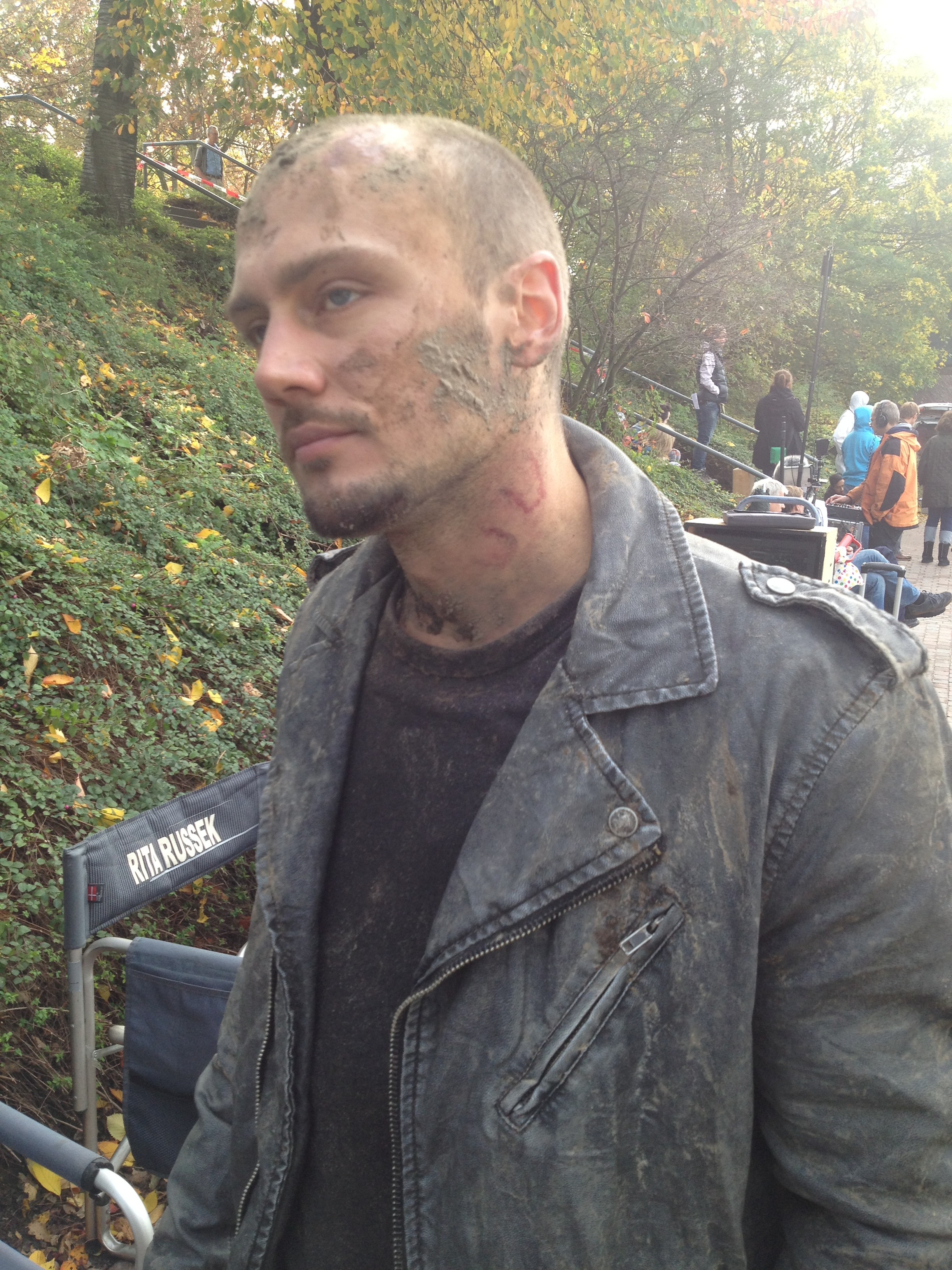 Juri Padel in Wilsberg (Das Geld der Anderen 2014)